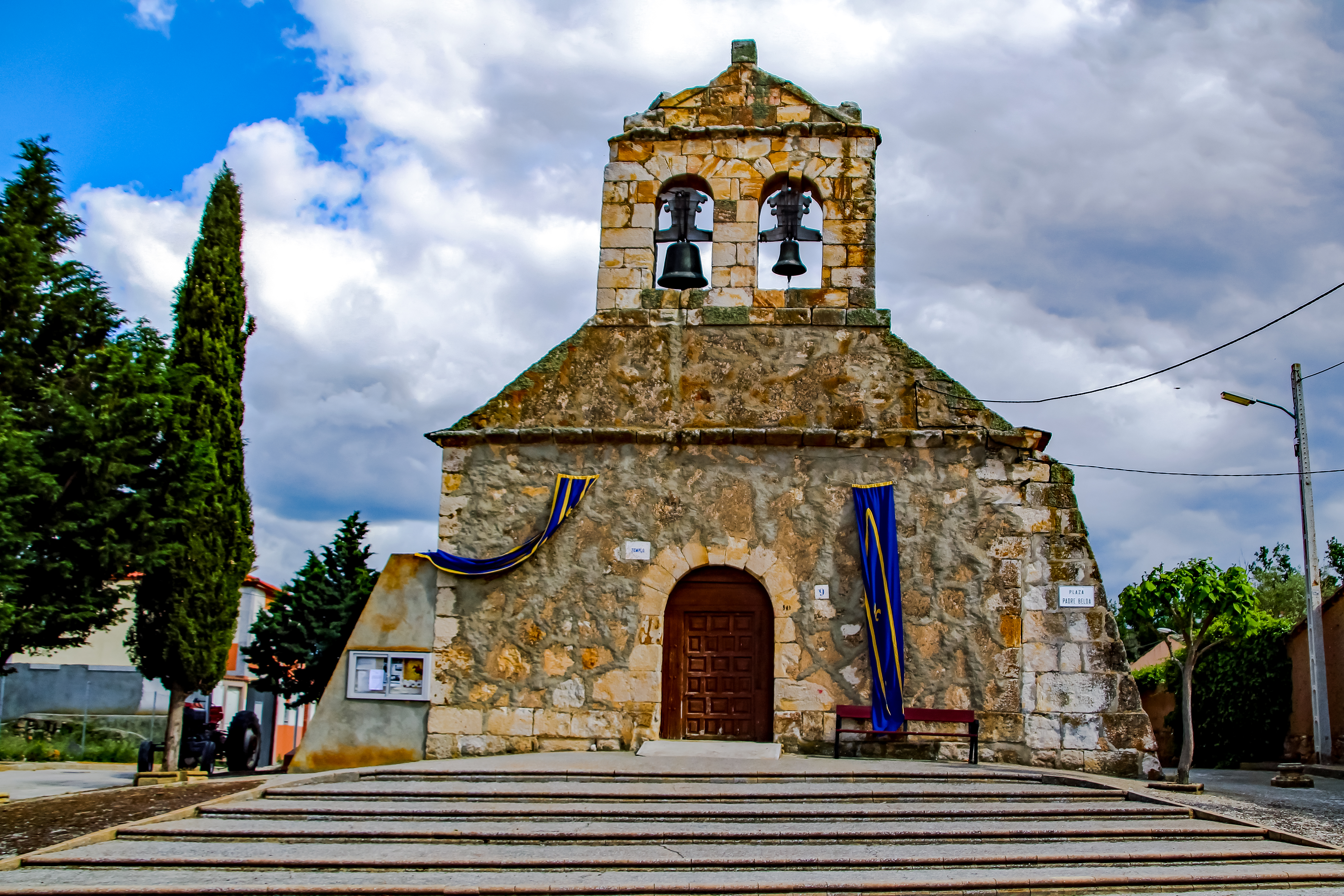 Carpio-Bernardo es una localidad del municipio de Villagonzalo de Tormes, comarca de Campo de Salamanca, en la provincia de Salamanca.